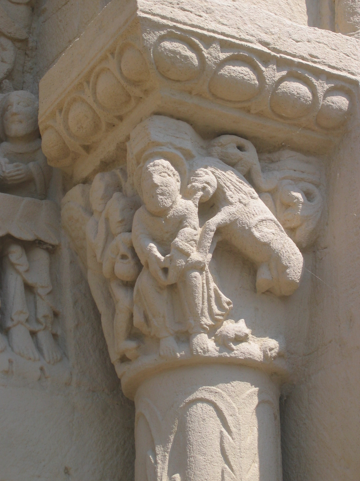 Chapiteau meridionale du tympan de l'Eglise Ste-Marie-Madeleine (Neuilly en Donjon)